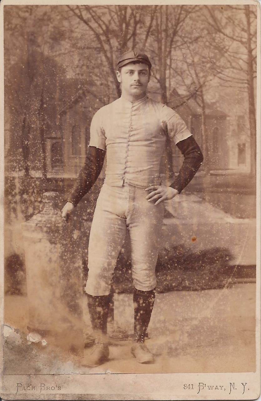 Henry "Tillie" Lamar Cabinet Card